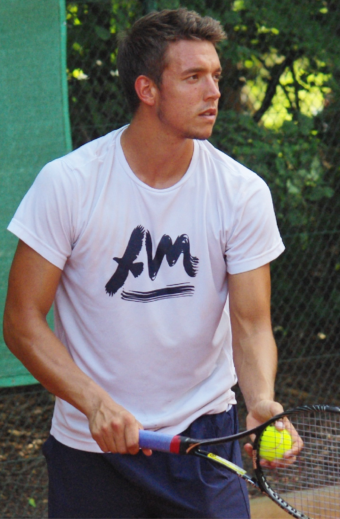 Andreas Mies während des Trainings (2014)